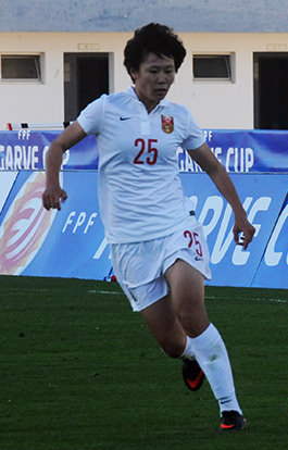 a_48_6738